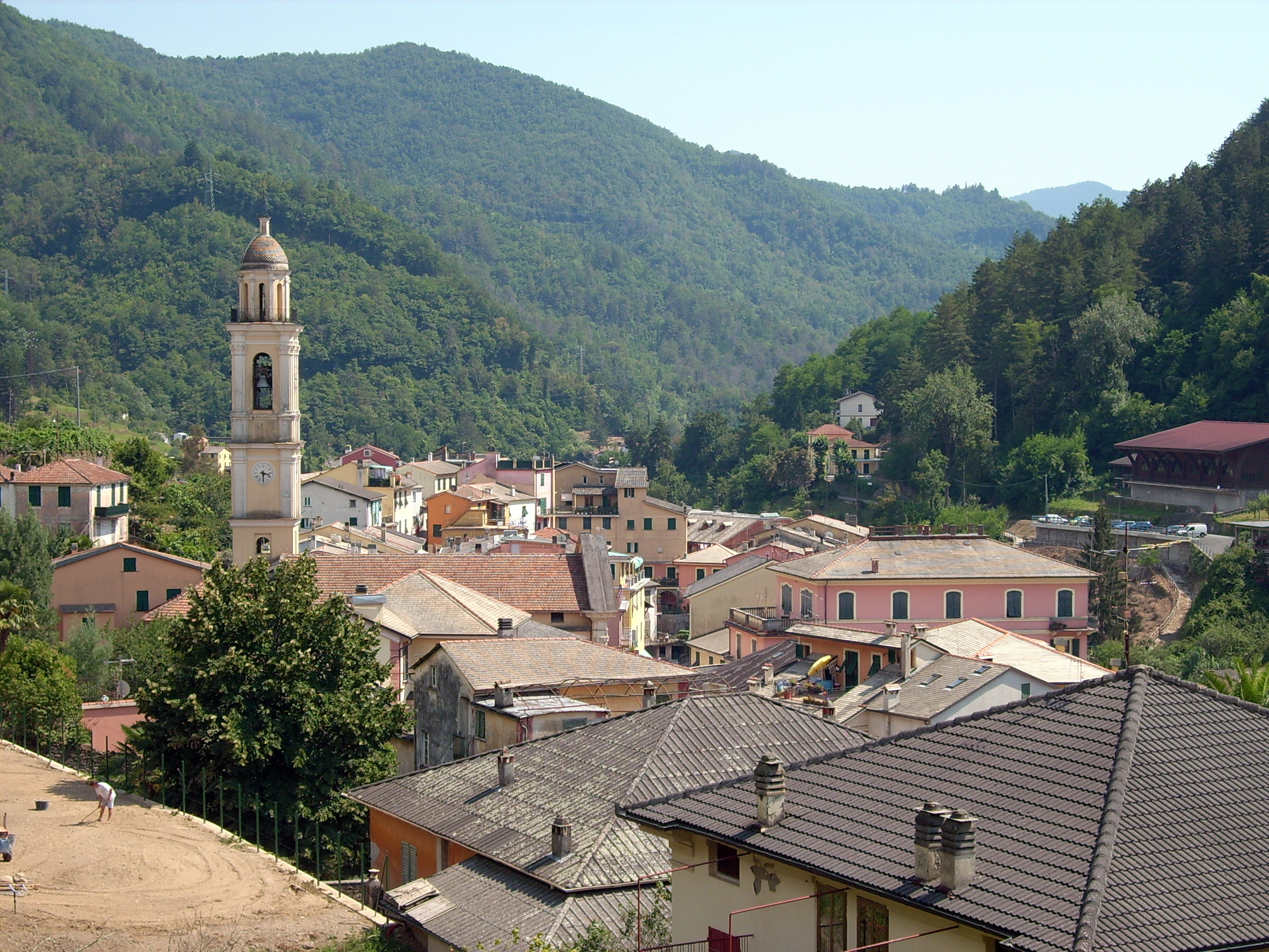 Borzonasca, Liguria, Italia